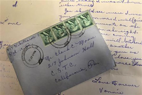 de amor